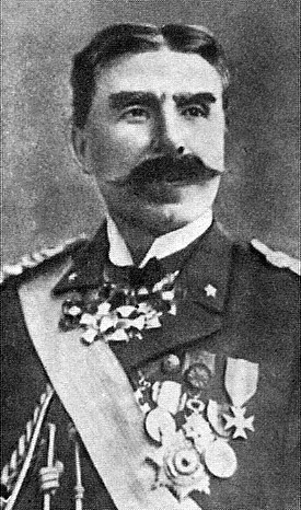 Vittorio Cuniberti, ingegnere navale